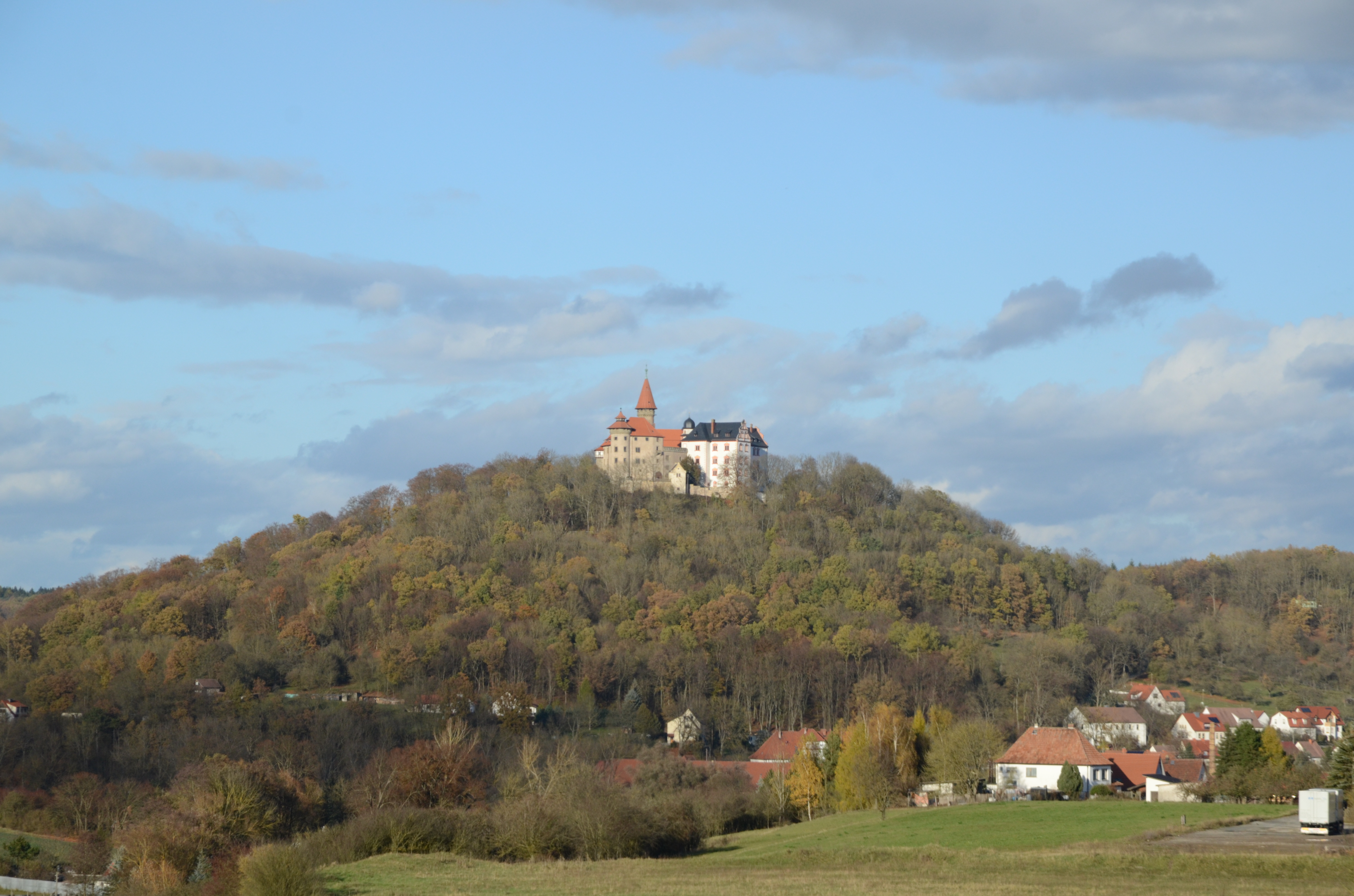 Veste Heldburg, von Südwesten